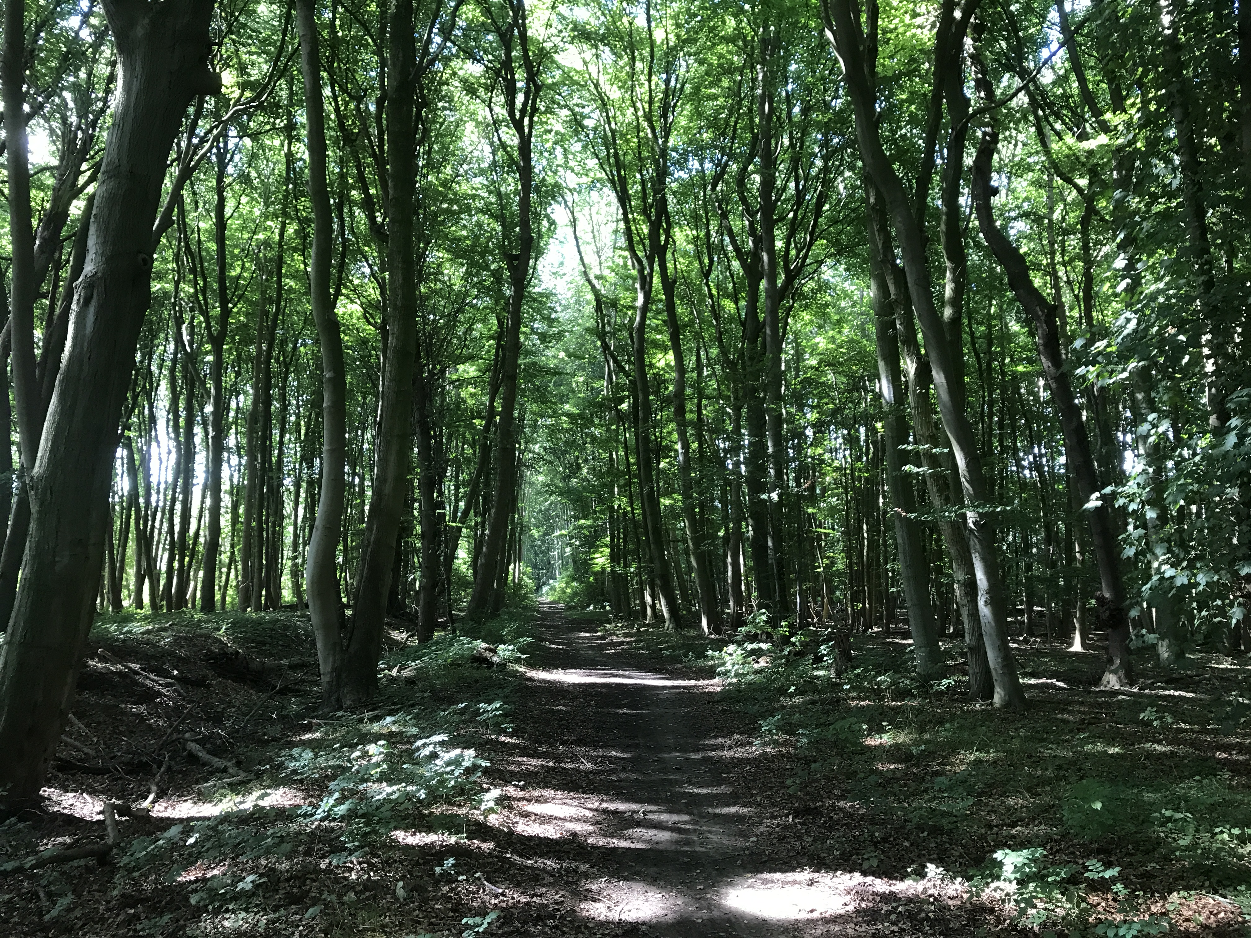 Naturschutzgebiet Kormorankolonie bei Niederhof in Mecklenburg-Vorpommern